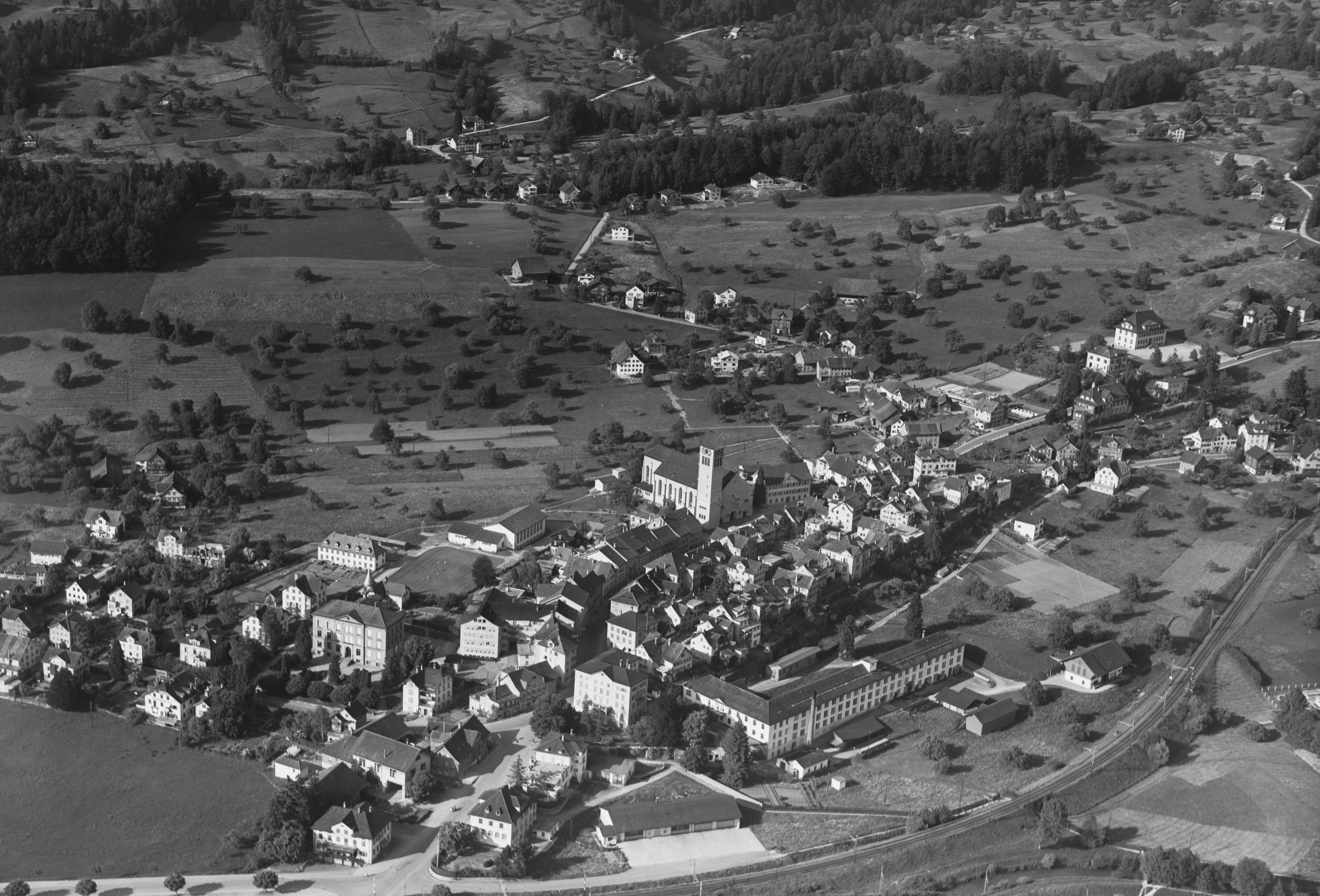 Tiefgeflogen